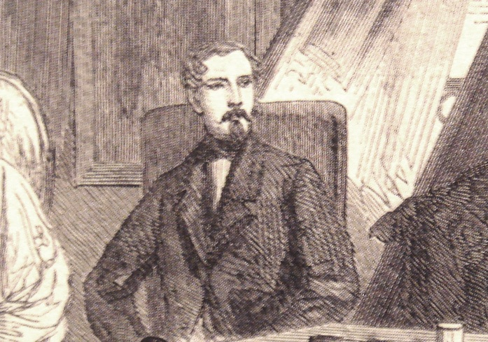 Gustave Duchesne de Bellecourt (Portrait)